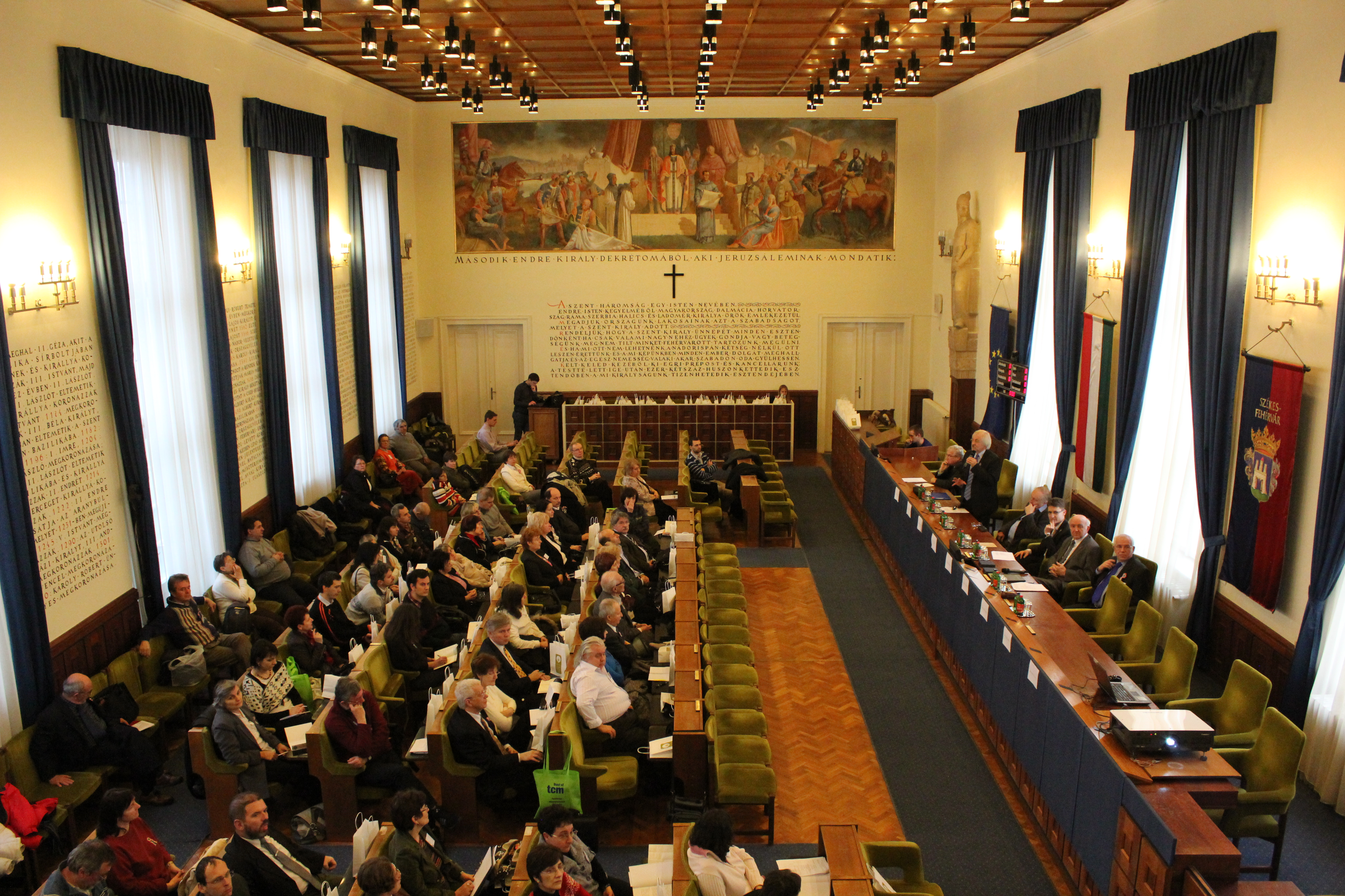 Az 56. Országos Fizikatanári Ankét és Eszközbemutató megnyitója a székesfehérvári Városháza tanácstermében. (2013. március 14. Székesfehérvár, Magyarország.)